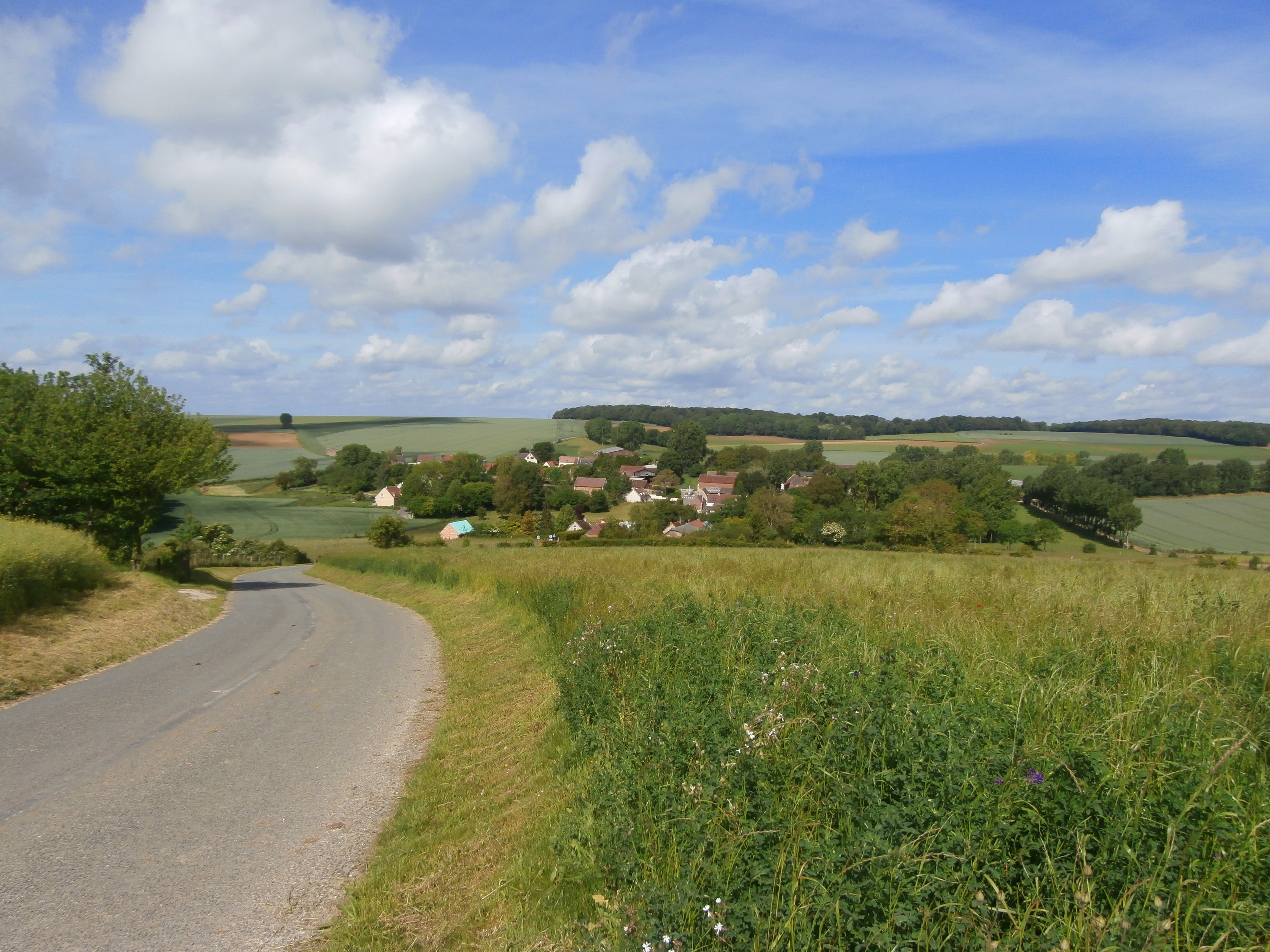 Le village de Rémécourt (60) depuis la route de Maimbeville.